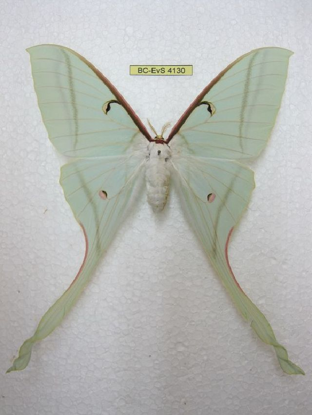 Actias rhodopneuma